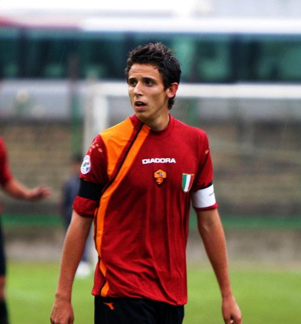 Leandro Greco capitano della Roma durante la finale della prima edizione del Trofeo Karol Wojtyla giocata allo Stadio Flaminio nel 2005